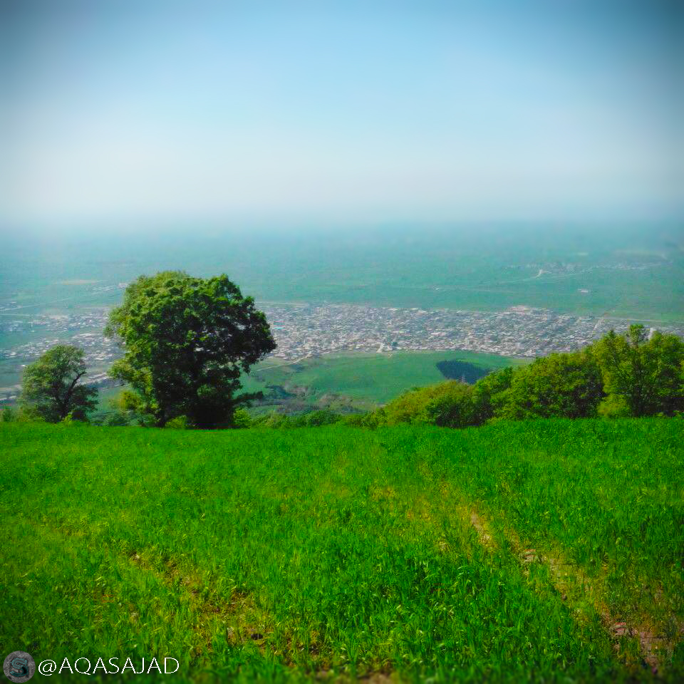 نمایی از شهرستان گالیکش از جنگل کاج های کوه نیلکوه